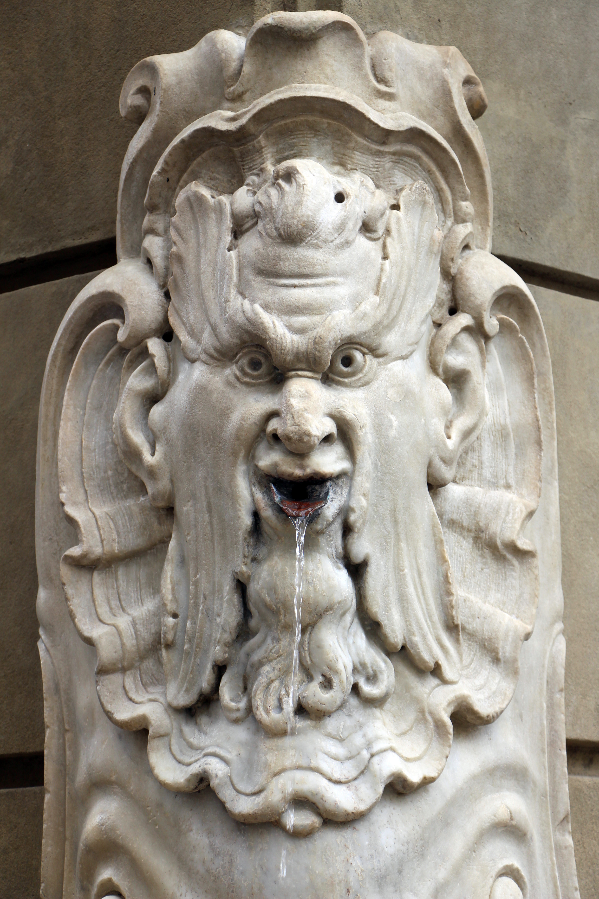 Firenze, vari siti (vedi filename e categorie)